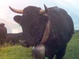 Vache d'Hérens, race combattive et typique du Valais.